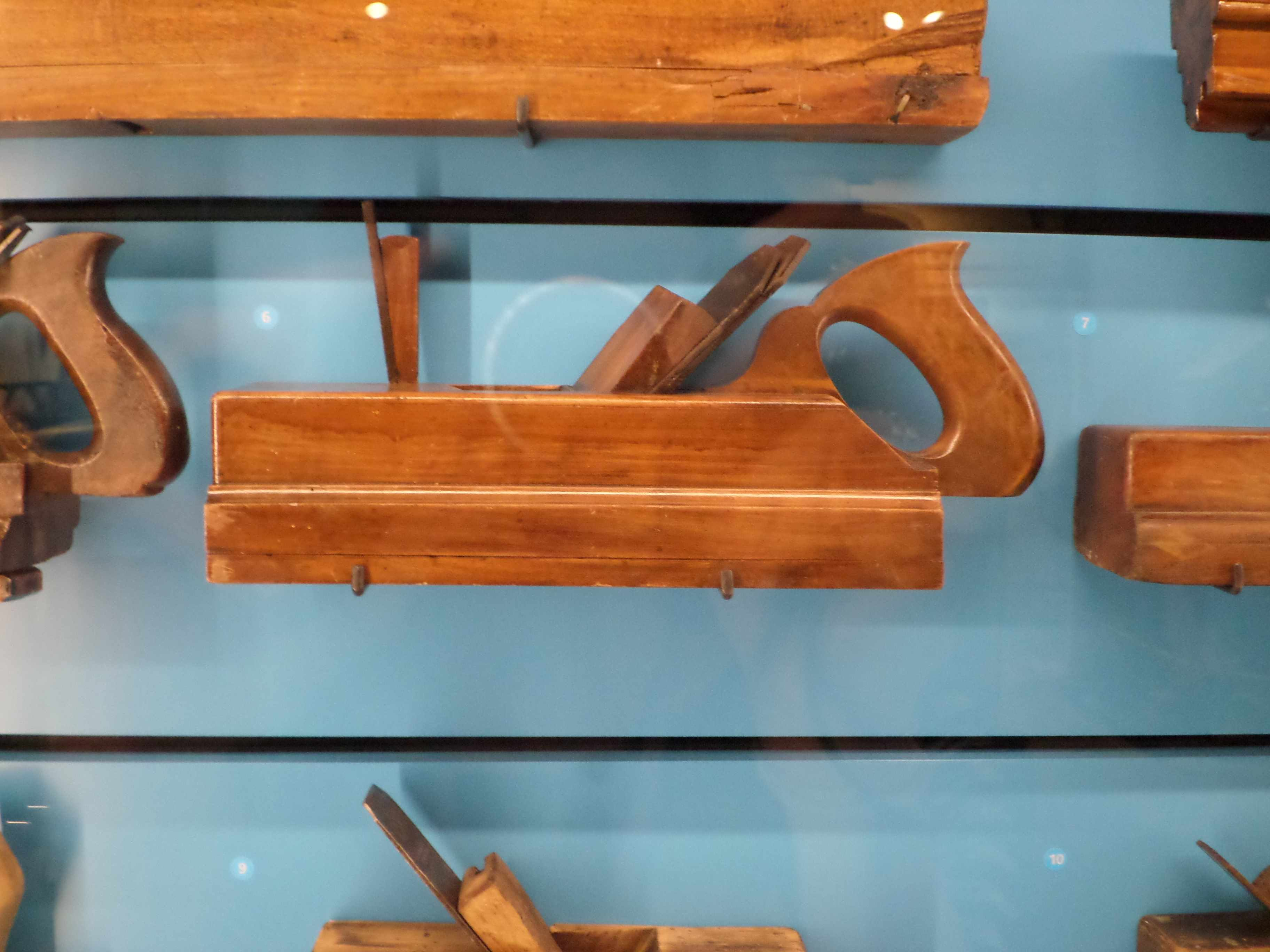 rabot